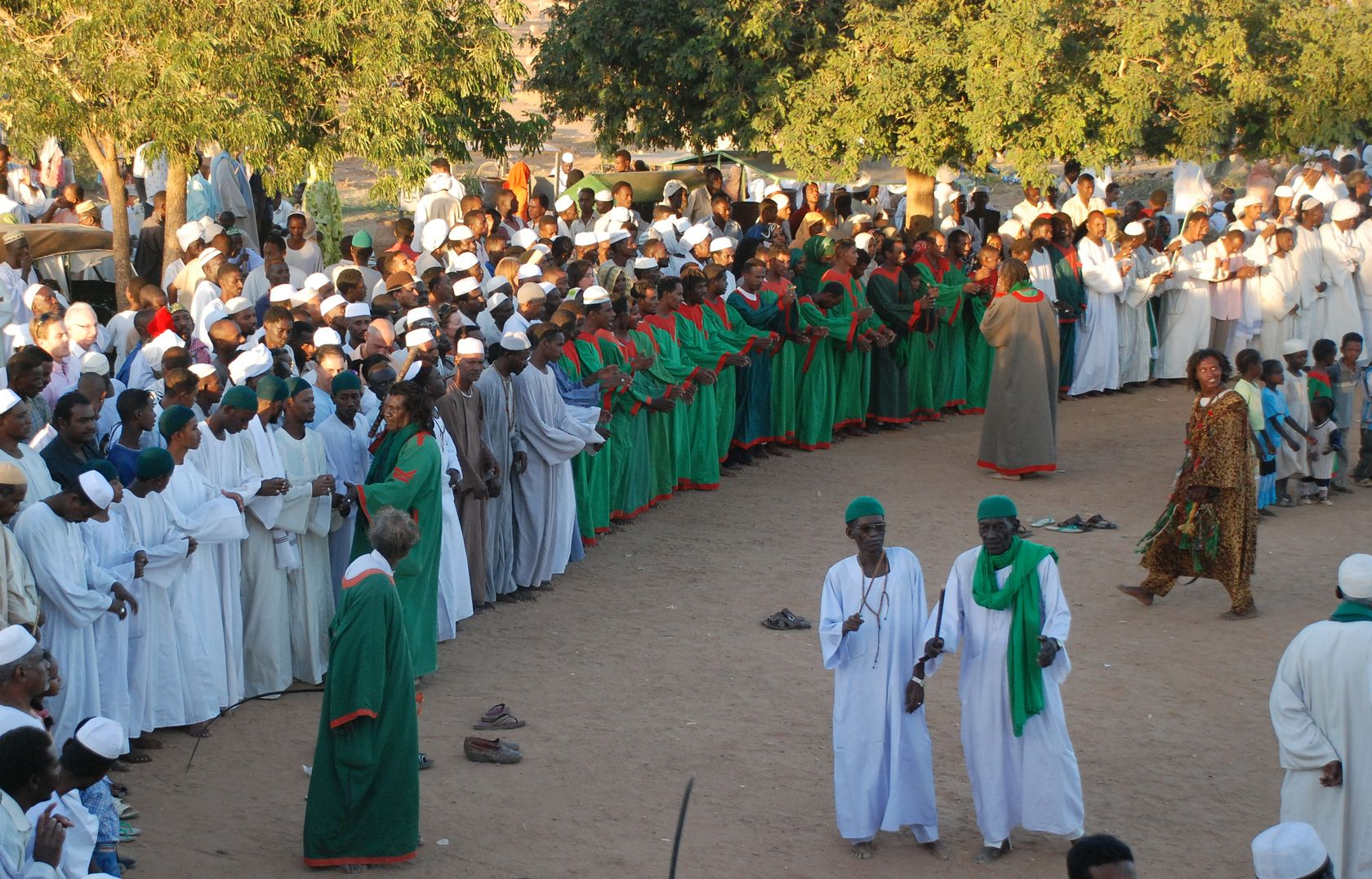 Omdurman, Sufi dancers